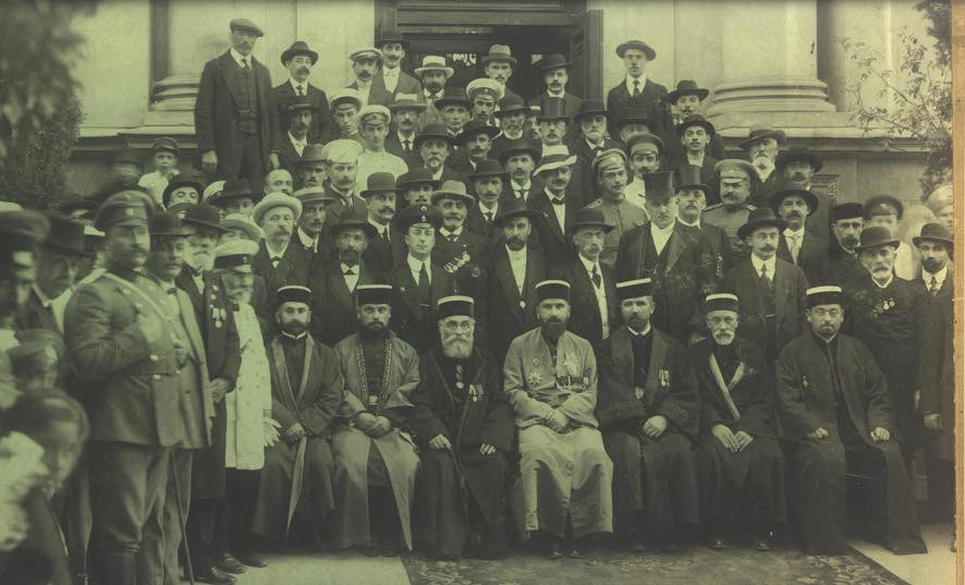 Фотография руководства Таврического и Одесского караимского духовного правления. 1916 год. Сидят (слева направо): Ормели Исаак Юфудович (1882—1940) — газзан в г. Симферополе, Ельяшевич Борис Саадьевич (1881—1971) — газзан в г. Евпатория, член Караимского духовного правления, Султанский Иосиф Исаакович (1851—1922) — газзан в г. Киеве, Шапшал Серая Маркович (1873—1961) — гахам Караимского духовного правления, Леви-Бабович Товия Симович (1879—1956) — газзан в г. Севастополе, Нейман Самуил Моисеевич (1844—1916) — член Караимского духовного правления, Катык Аарон Ильич (1883—1942) — старший газзан в г. Евпатория, член Караимского духовного правления.